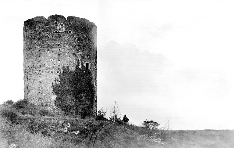 Donjon du Château de Fréteval : côté est.